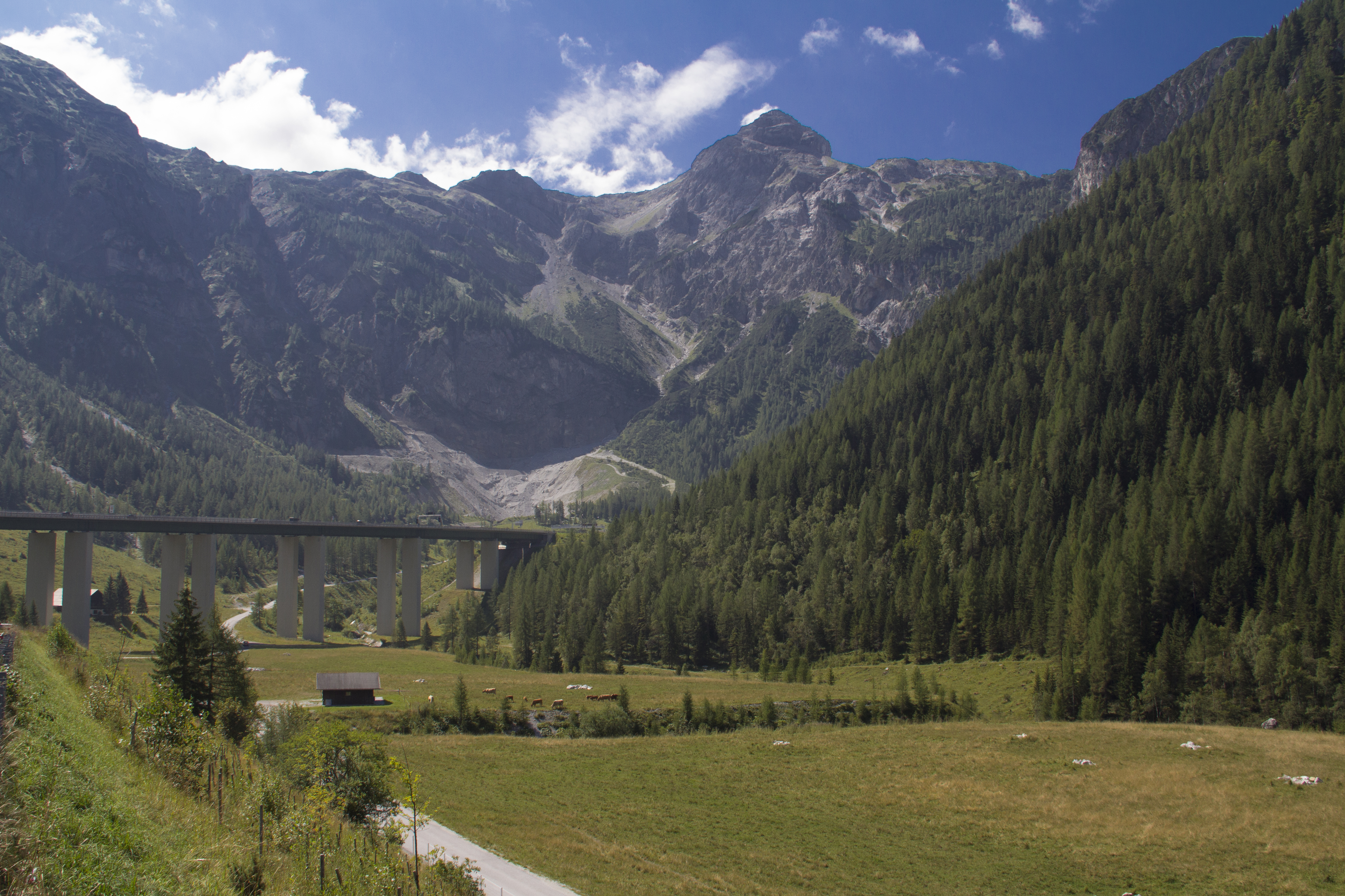 Alpen Oostenrijk